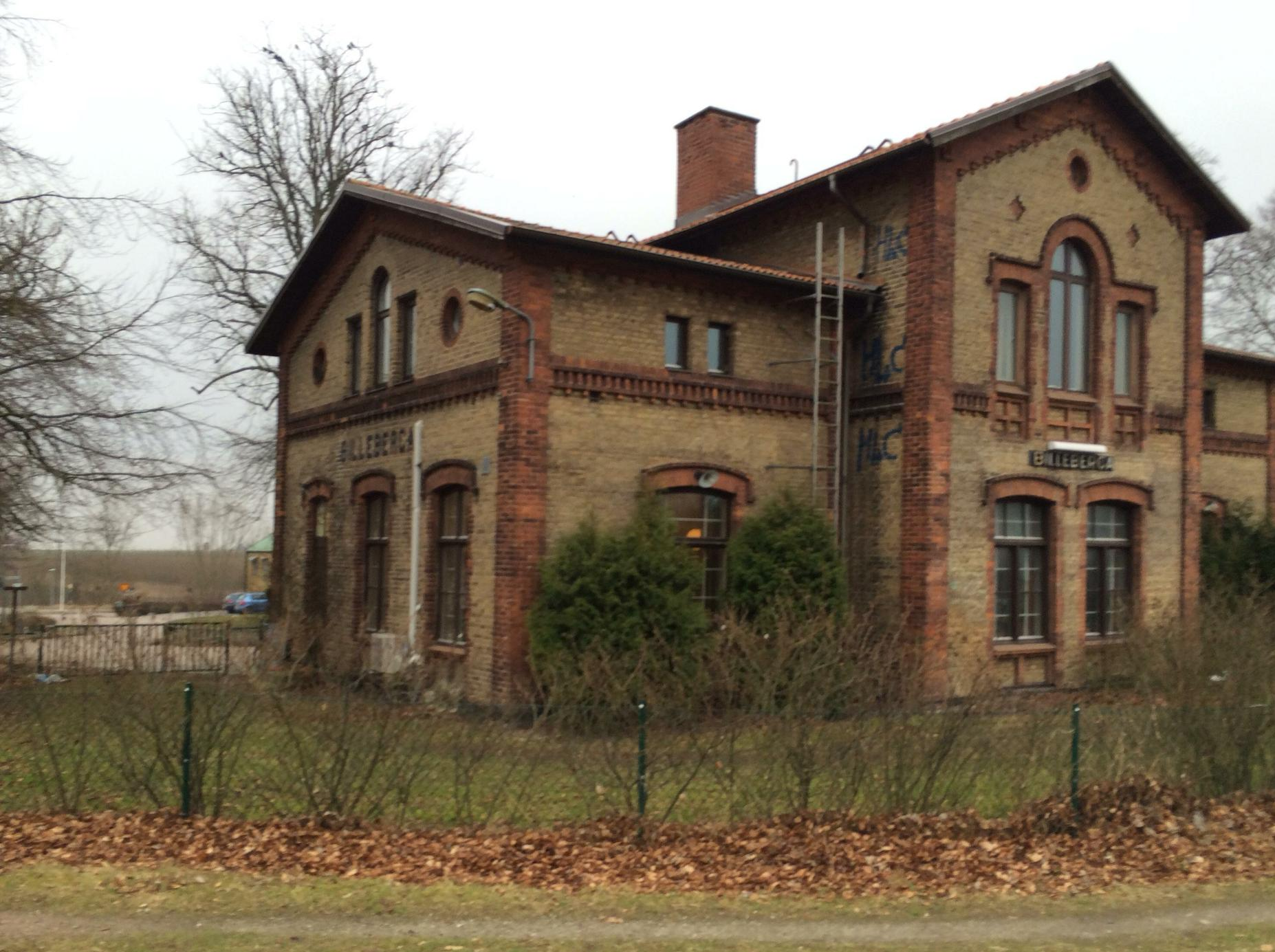 Hedvägen, Billeberga